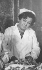 Foto B&N de Pepita Muñoz. Carne (1968).